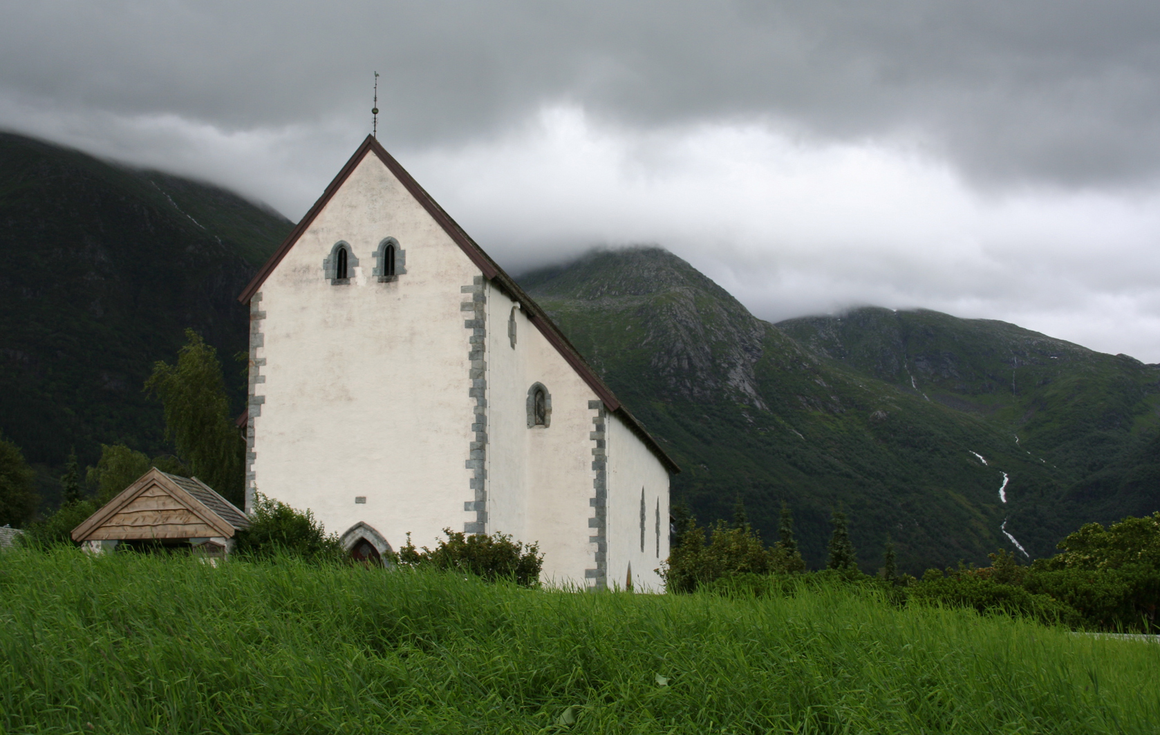 rosendal kirke